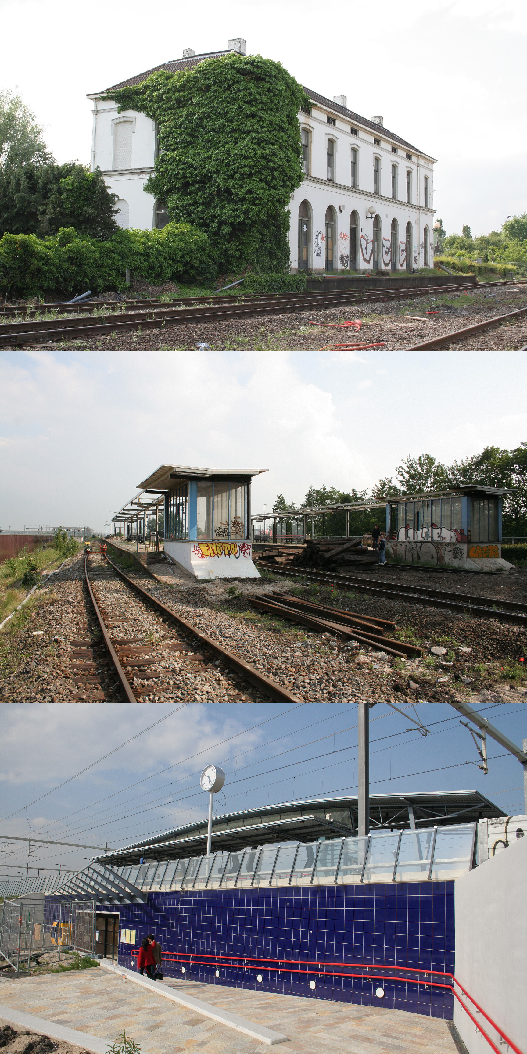 Alledrie de stations Abcoude. Uit 1871, 1970 en 2006.